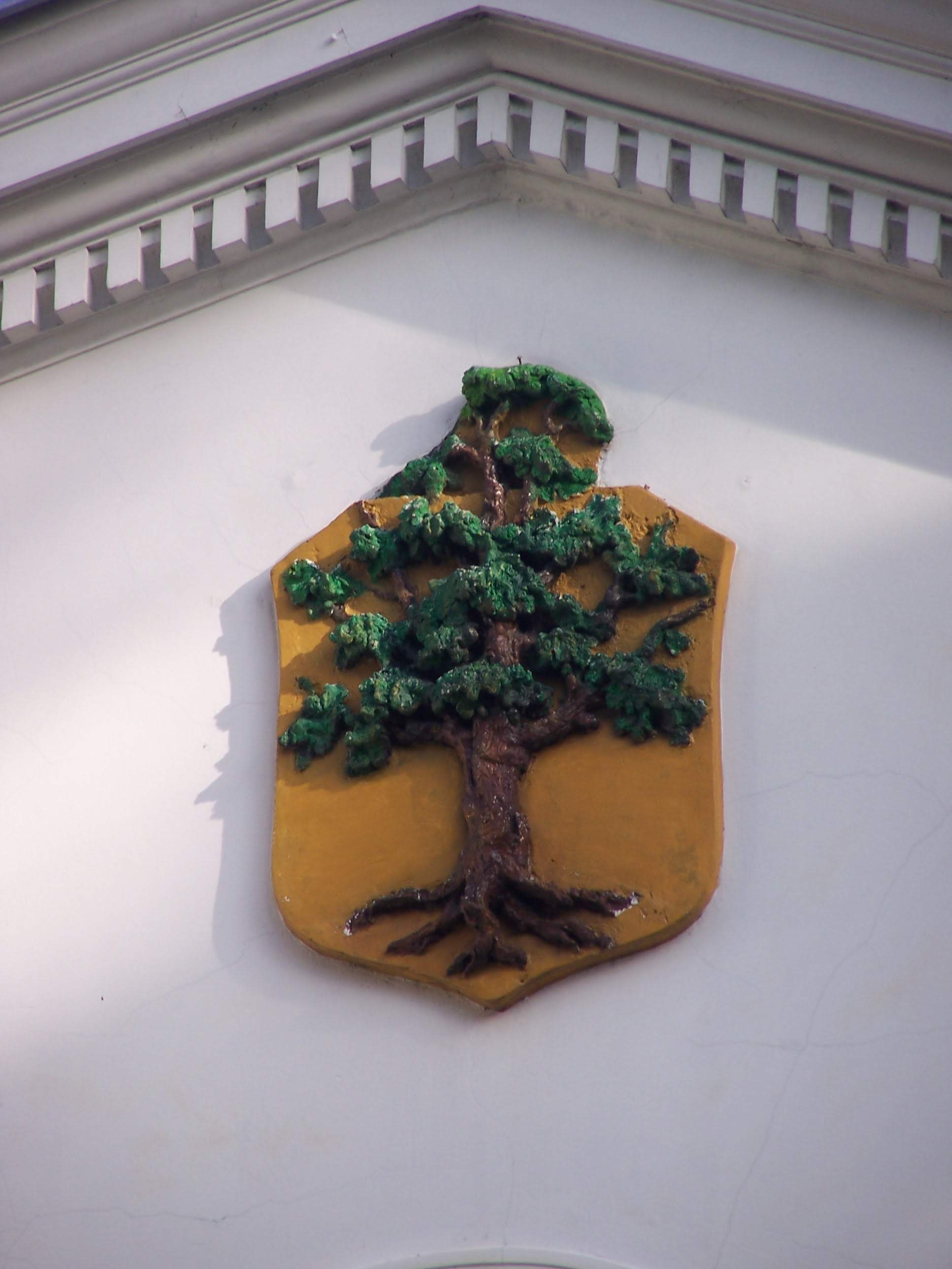 Herb rodziny Dąmbskich, na frontowej ścianie budynku przy ul. Piłsudskiego w Konstancinie-Jeziornie.